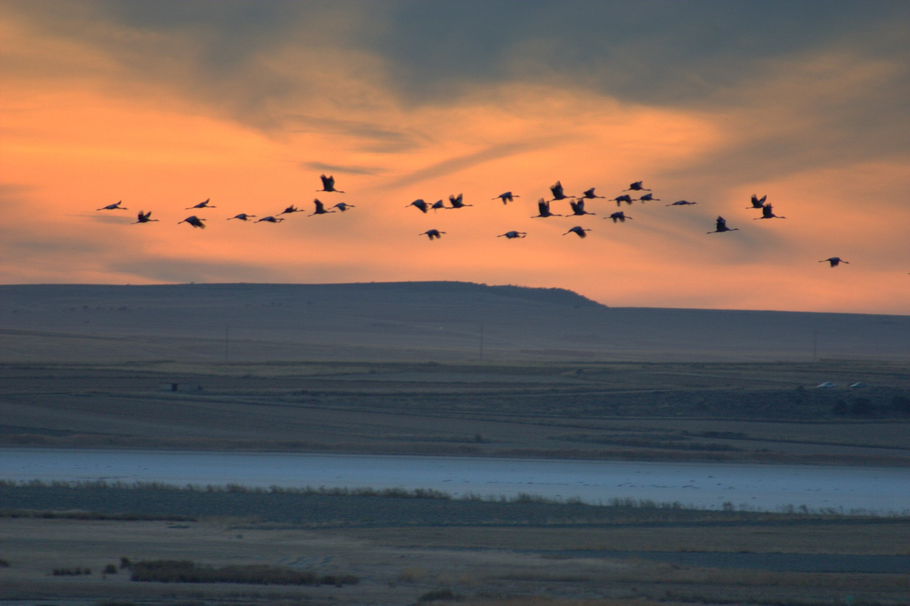 Fotografía Comarca del Jiloca